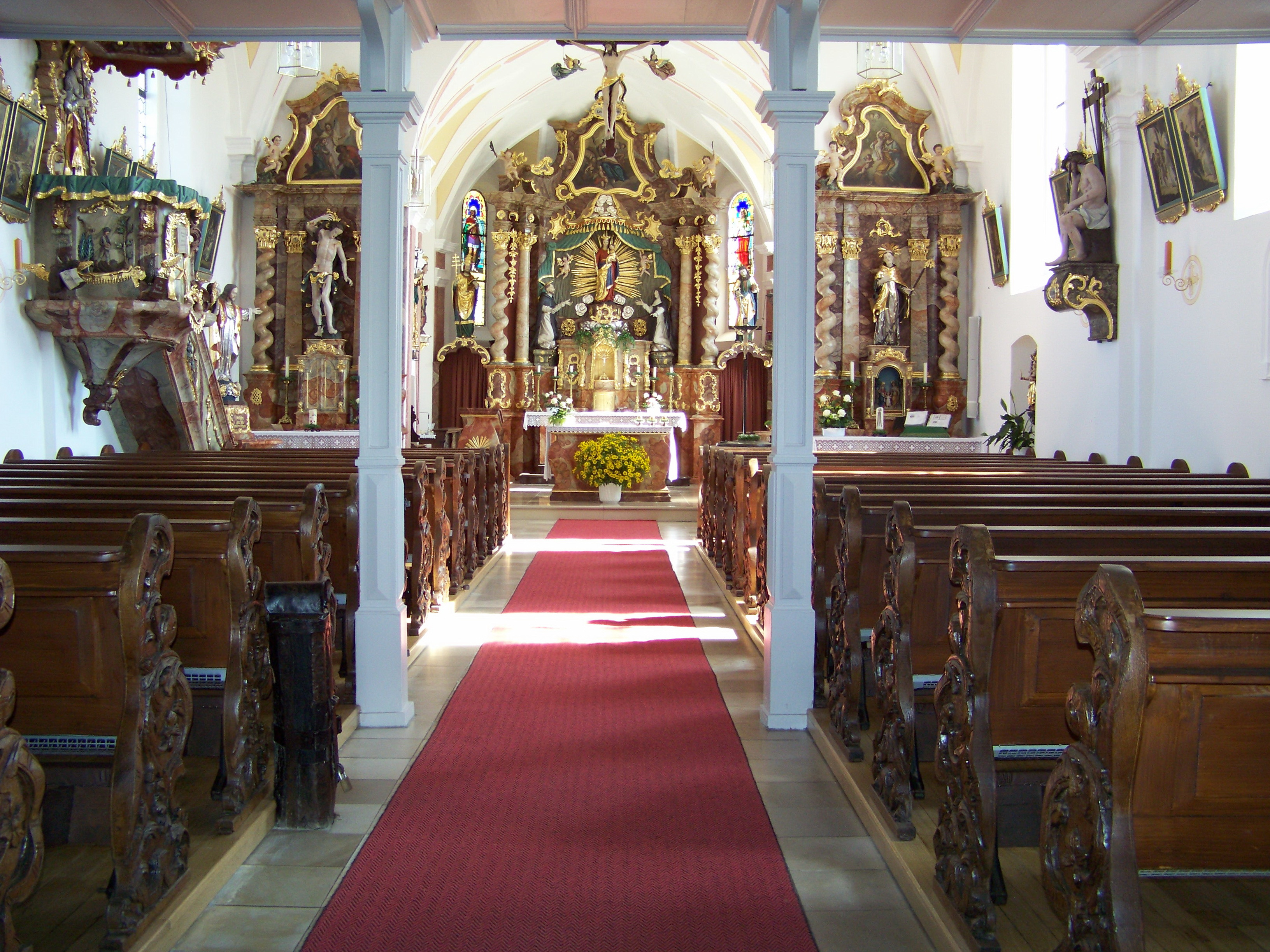 Hohenthann, Schmatzhausen. Kirche St. Katharina. Innenraum. Der etwas eingezogene Chor hat drei Joche und ist mit drei Achteckseiten geschlossen. Vom ehemaligen Netzgewölbe, das auf rechteckigen Wandpfeilern und spitzen Schildbogen ruhte, sind die Rippen abgeschlagen. Jetzt Tonne mit Gurtbogen. Die spitzbogigen Stichkappen sind erhalten. Den Wandpfeilern sind jetzt Pilaster vorgelegt. Chorbogen rundbogig verändert. Das dreijochige Langhaus hat ein barockes Tonnengewölbe mit Gurtbogen und Stichkappen. Die Wände sind durch verkröpfte Pilaster gegliedert. Fenster barock verändert; sie schließen im eingezogenen Rundbogen.